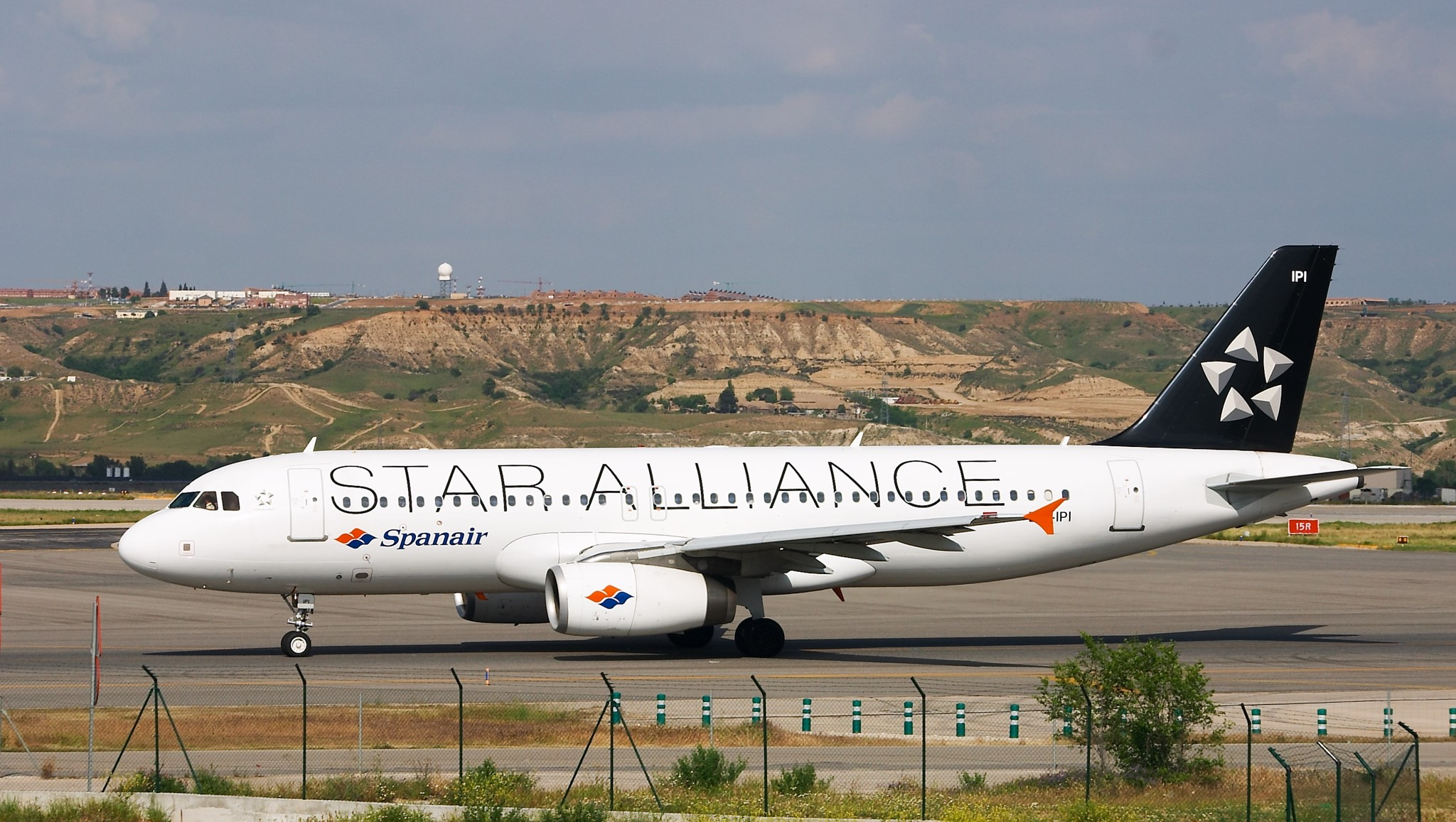 Airbus A320-232 de Spanair rodando para despegar en el aeropuerto de Madrid Barajas.